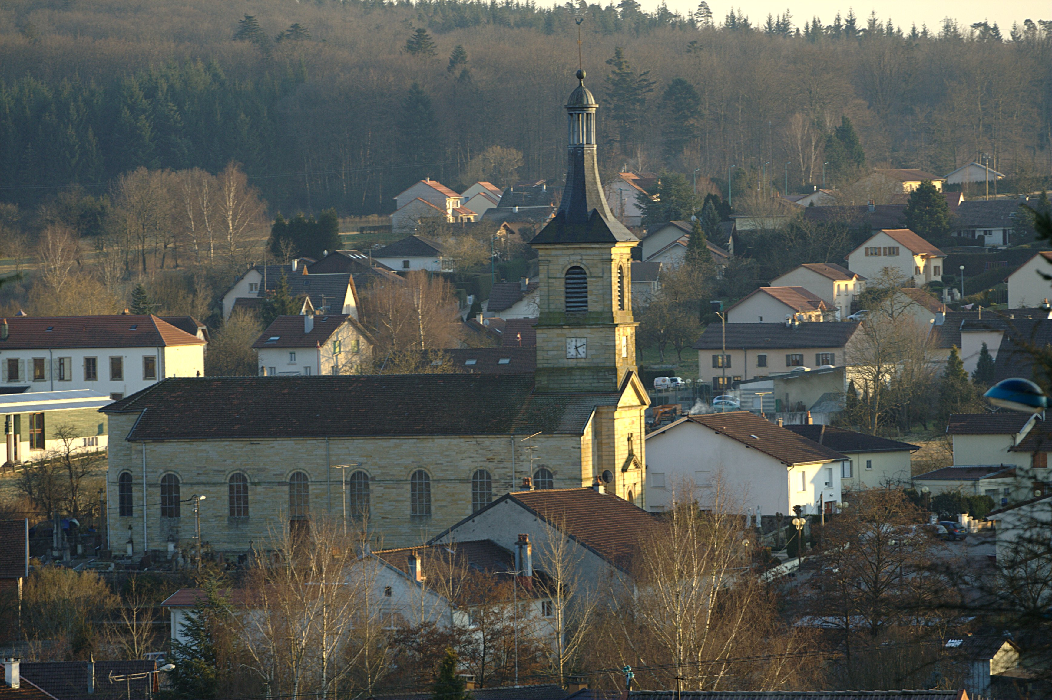 Eglise Saint-Luc de Deyvillers, France